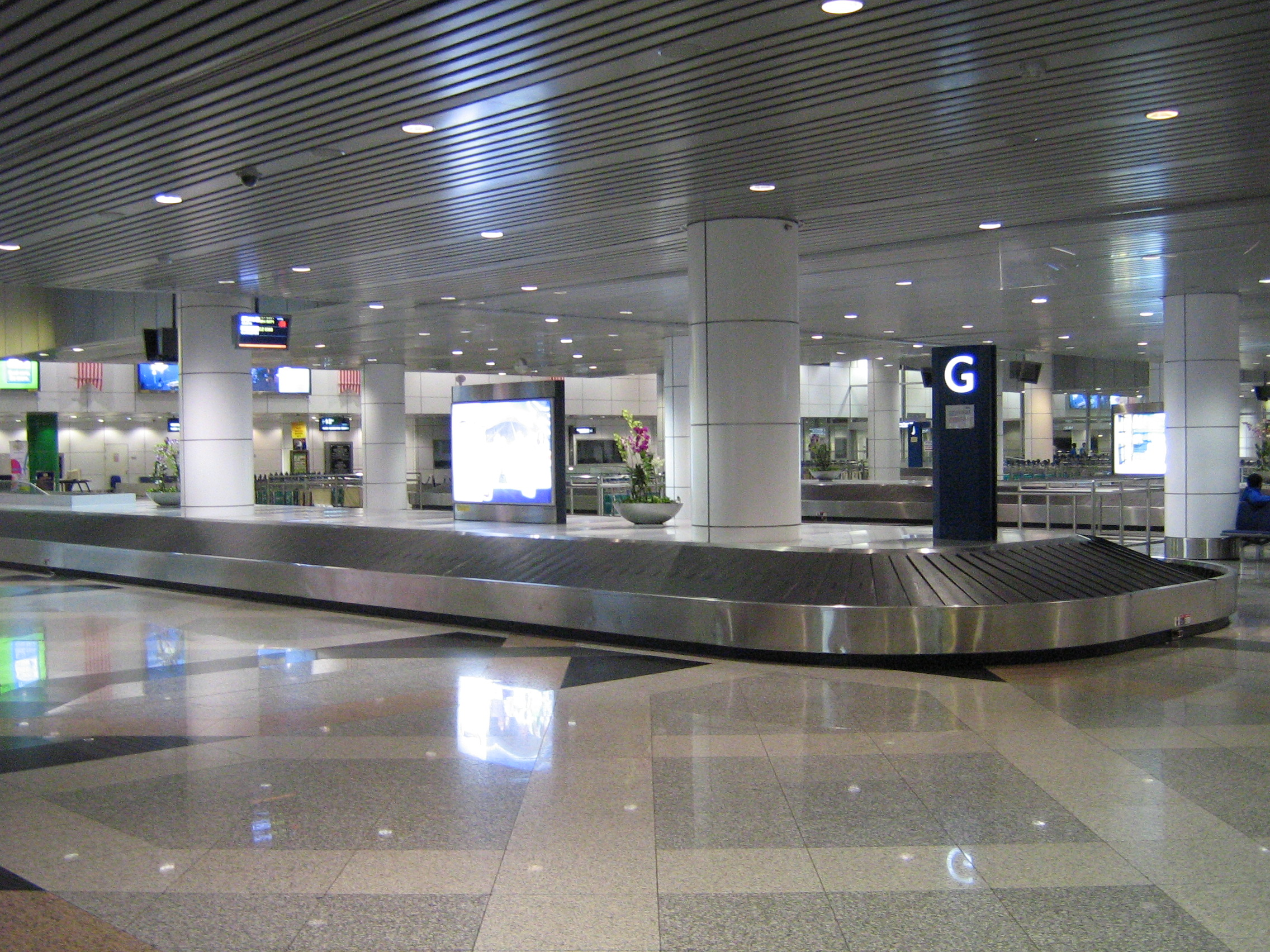 baggage reclaim at KLIA